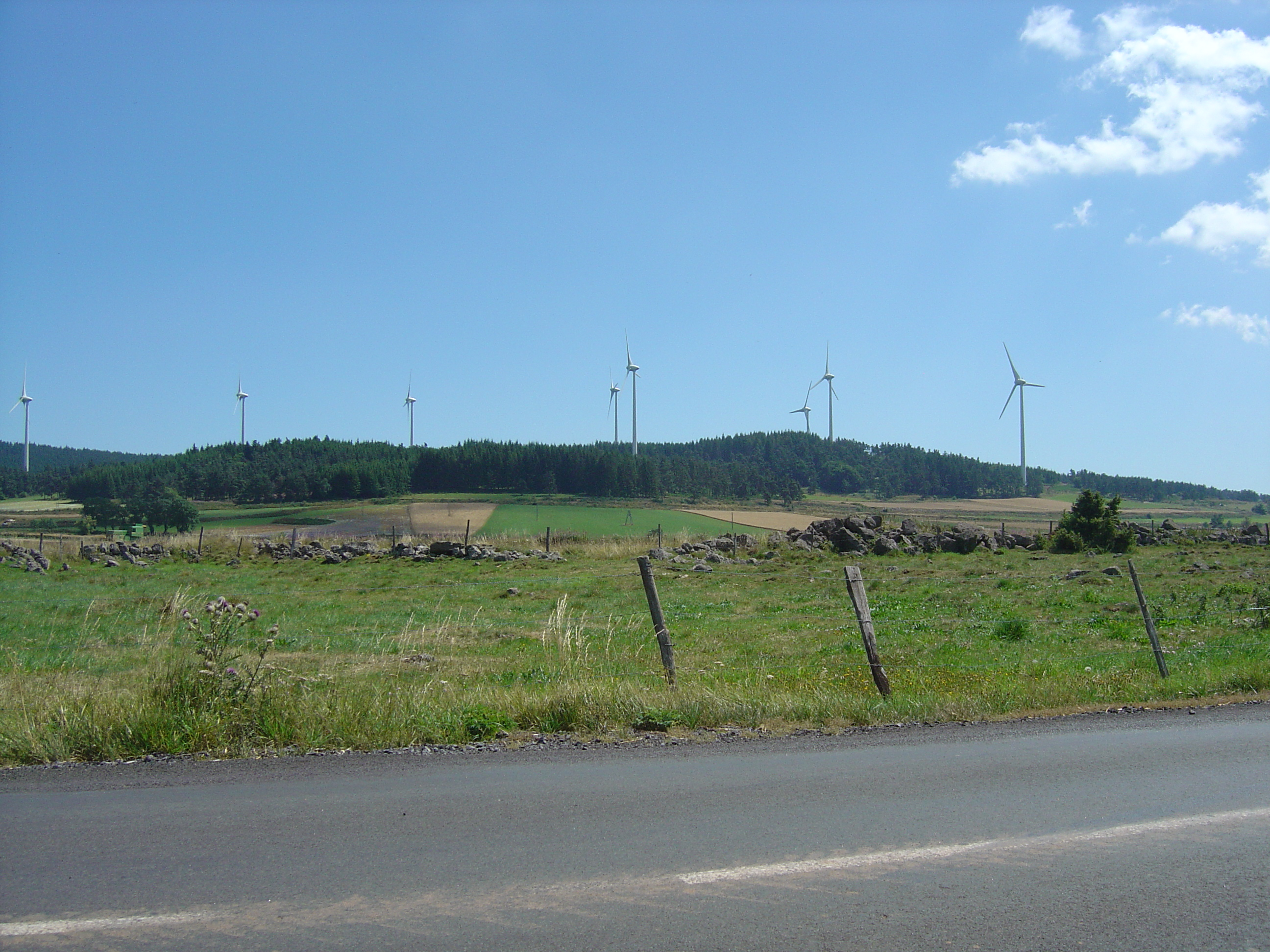 Eoliennes de Saint-Jean Lachalm (massif du Devès, Haute-Loire 43)